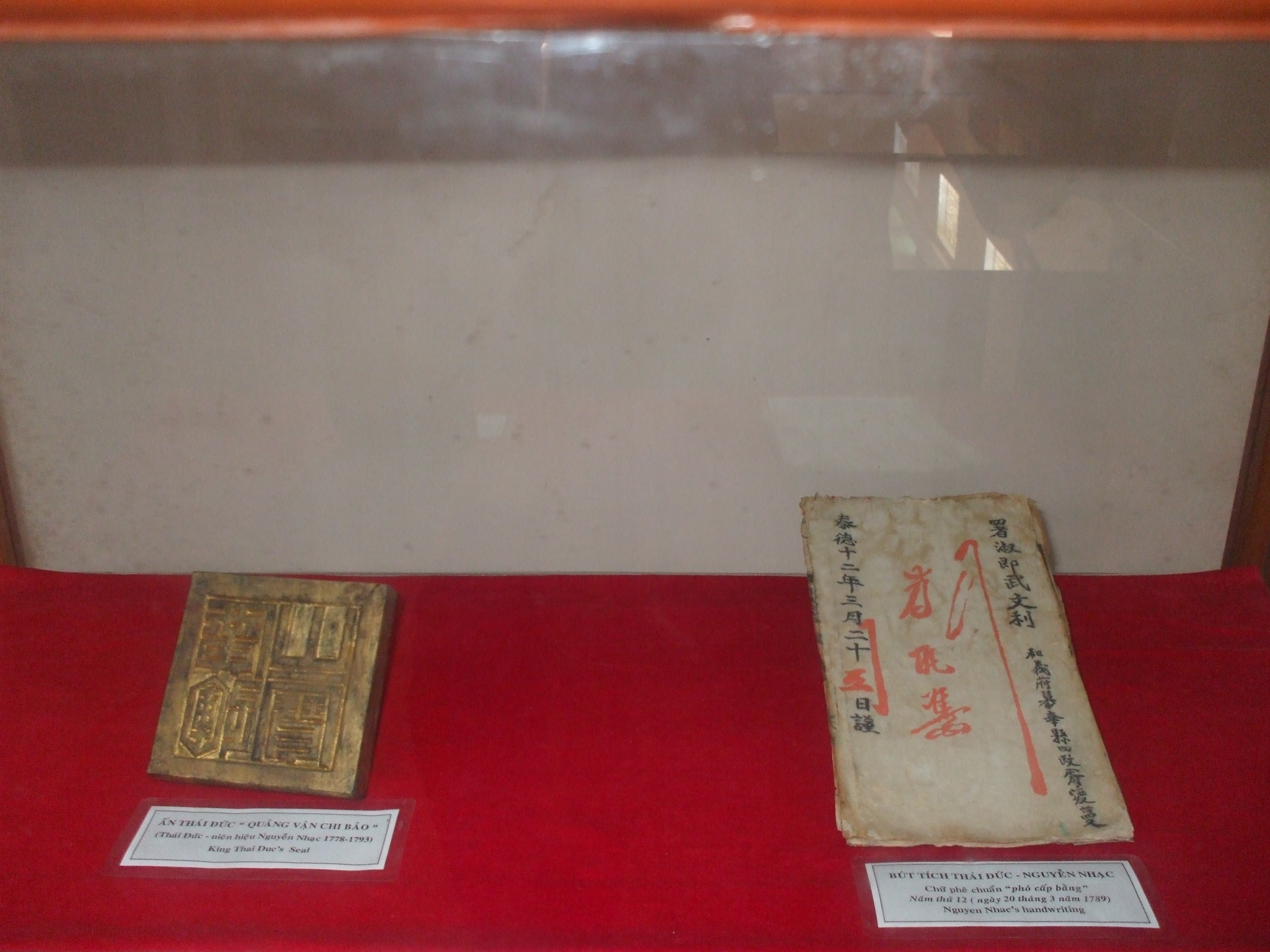 Ấn Quảng Vận Chi Bảo và thủ bút của Thái Đức hoàng đế.